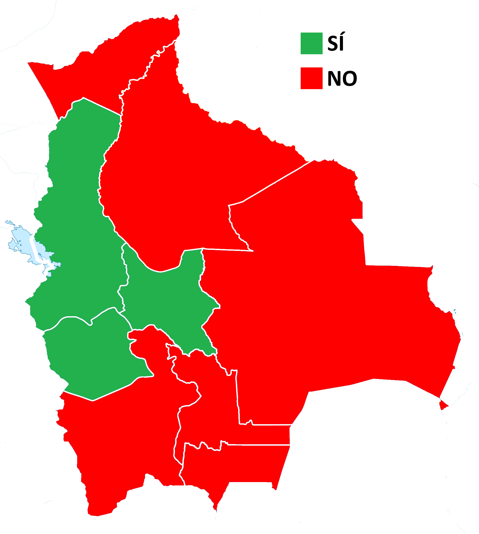 Resultados del referéndum de Bolivia de 2016.